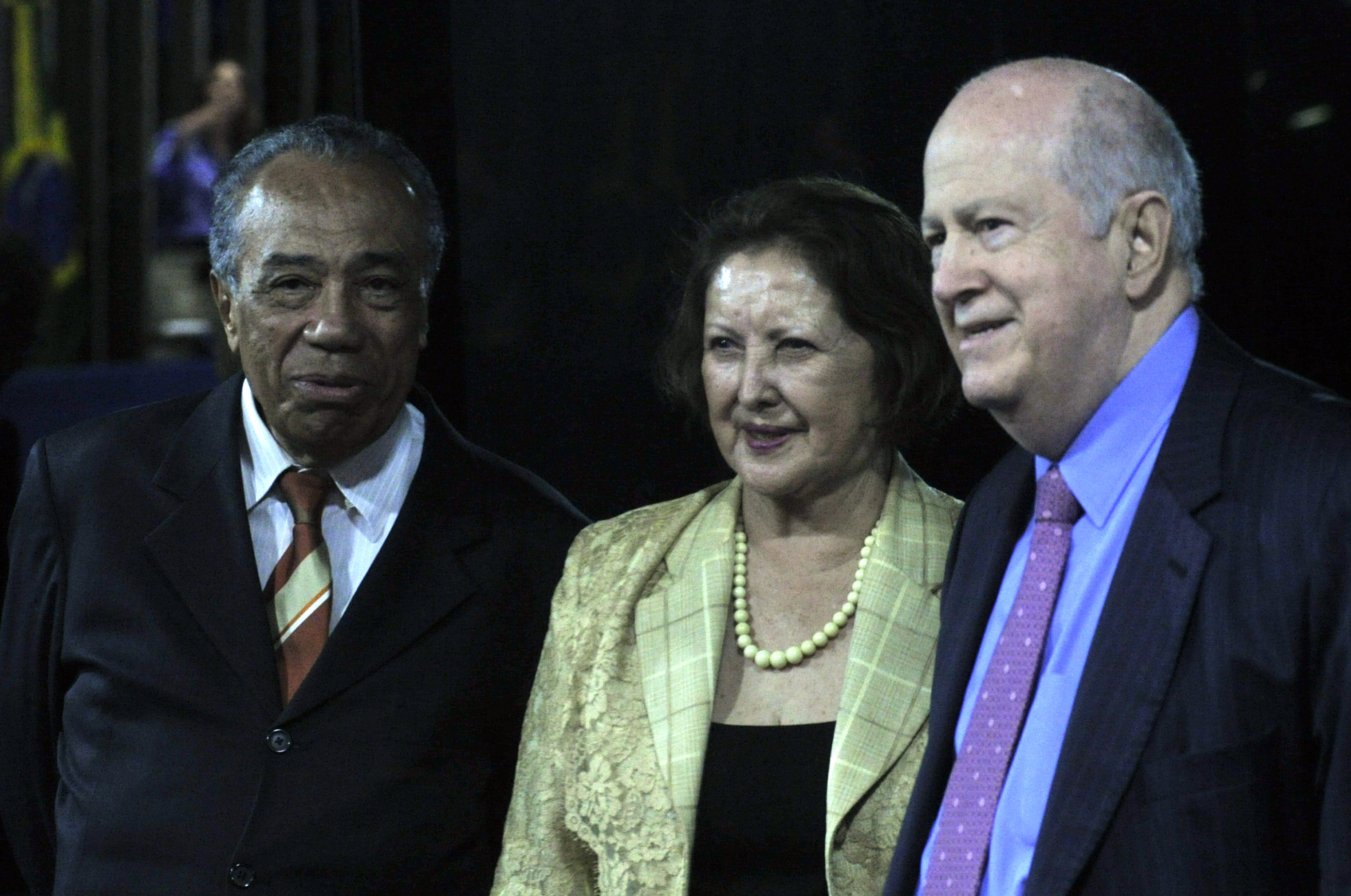 Plenário do Senado durante sessão deliberativa ordinária. Participam: prefeito de Aracajú, José Alves; senadora Maria do Carmo (DEM-SE); ex governador de Sergipe, Albano Franco. Foto: Geraldo Magela/Agência Senado